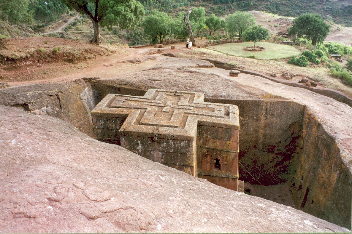 Die Kirche Bet Giyorgis im äthiopischen Lalibela von oben betrachtet